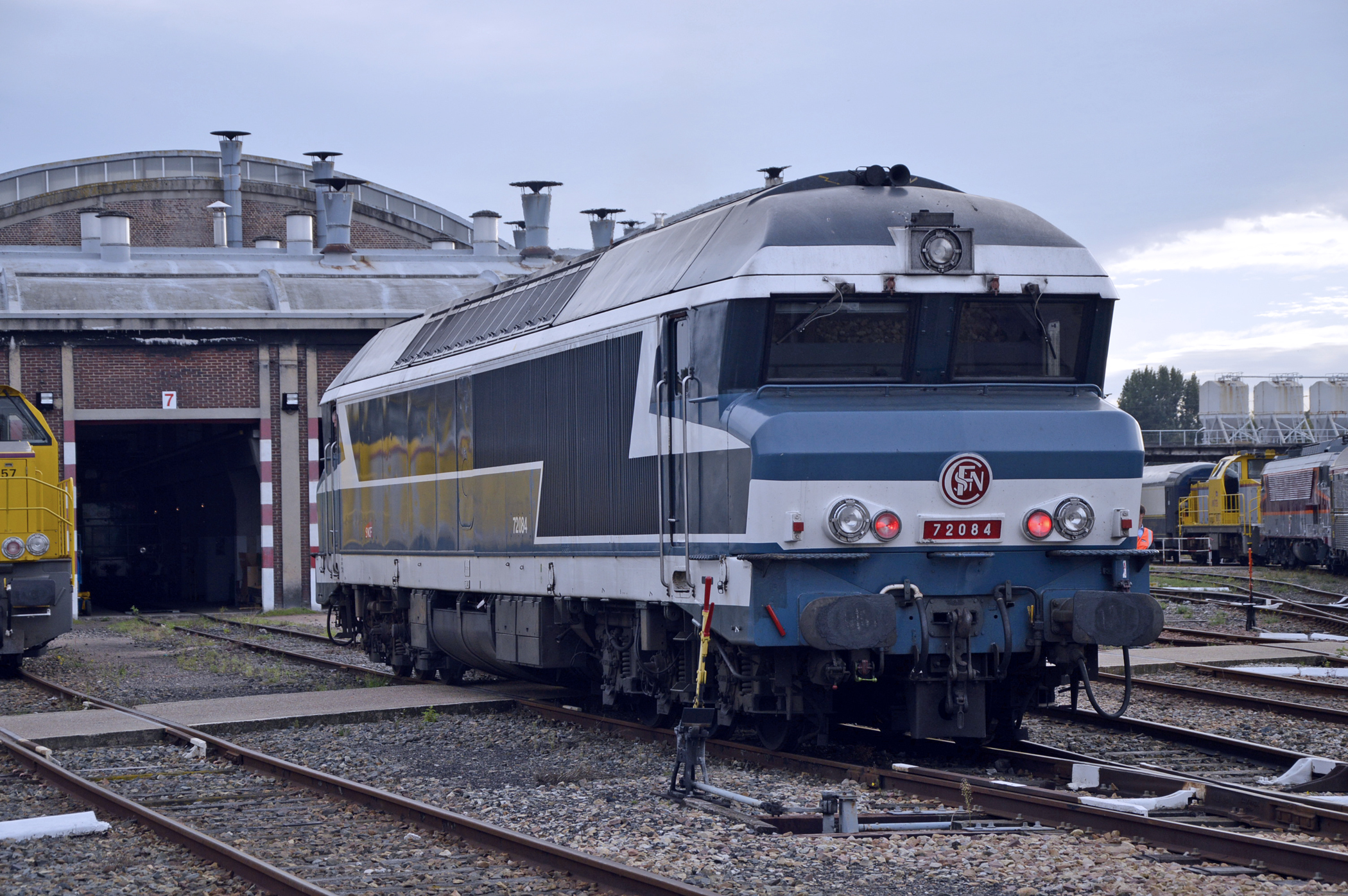 CC 72084